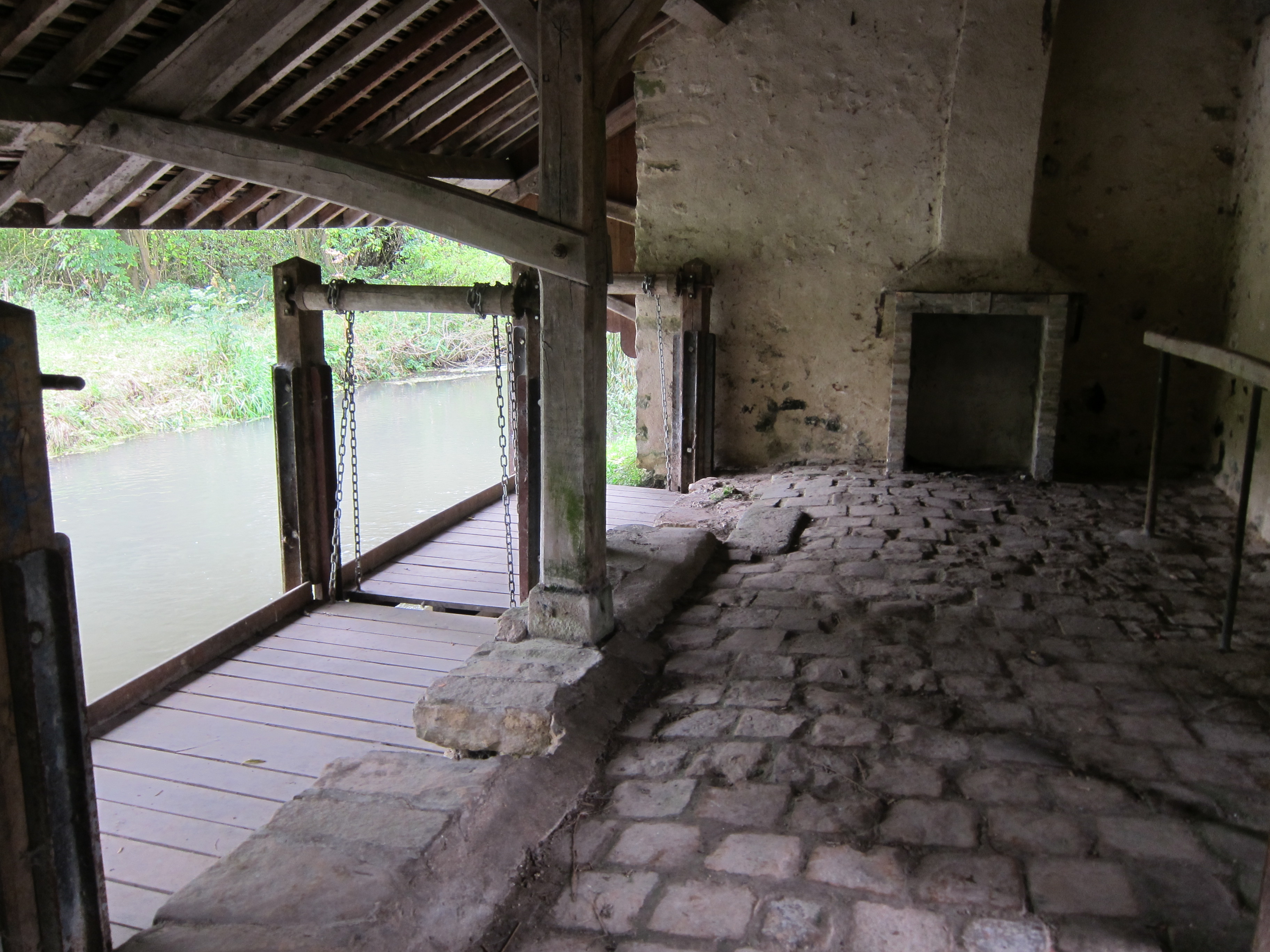 Lavior interior